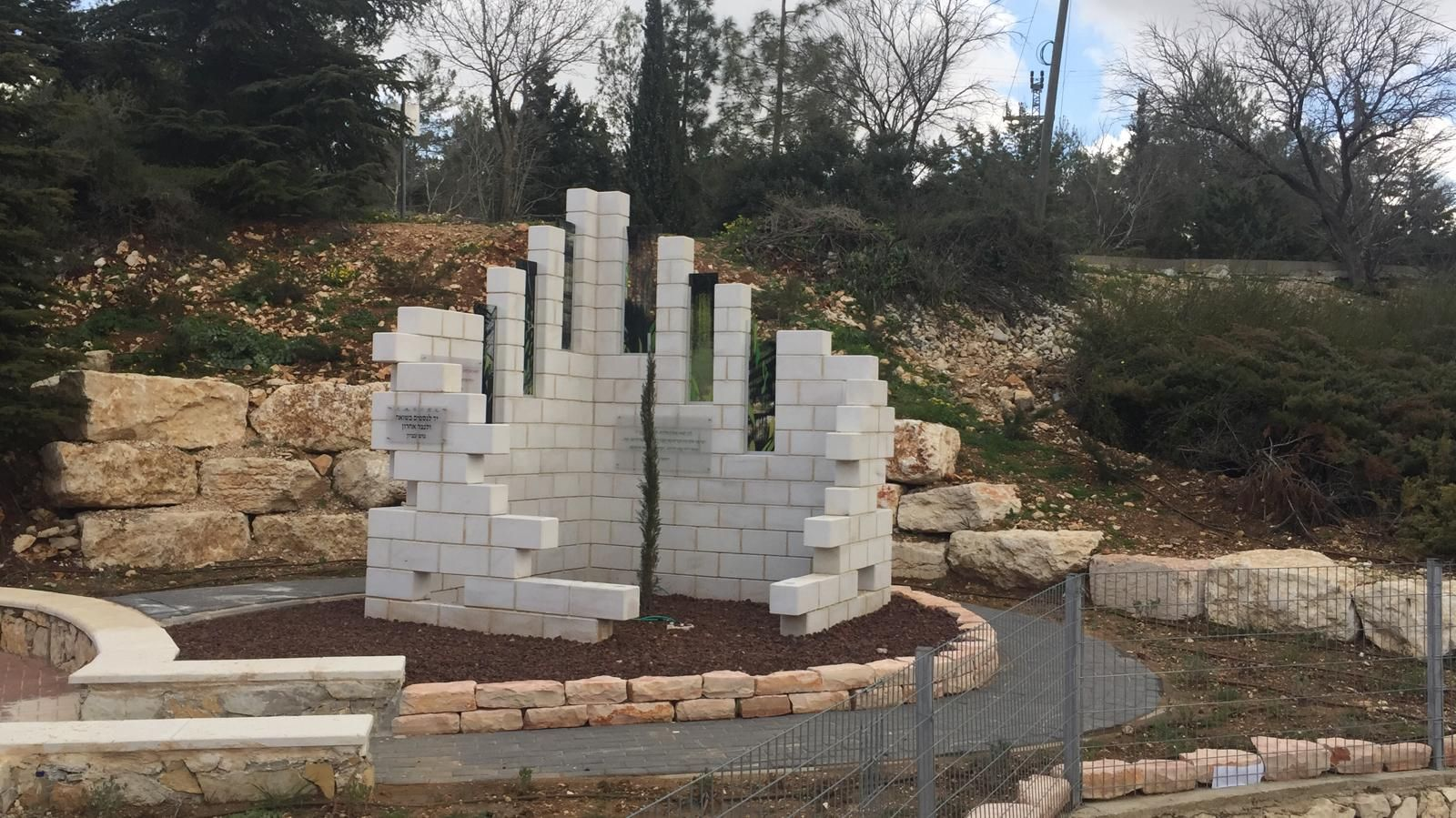 אנדרטה לזכר 15 נצר אחרון שנפלו בקרבות של מלחמת העצמאות בגוש עציון